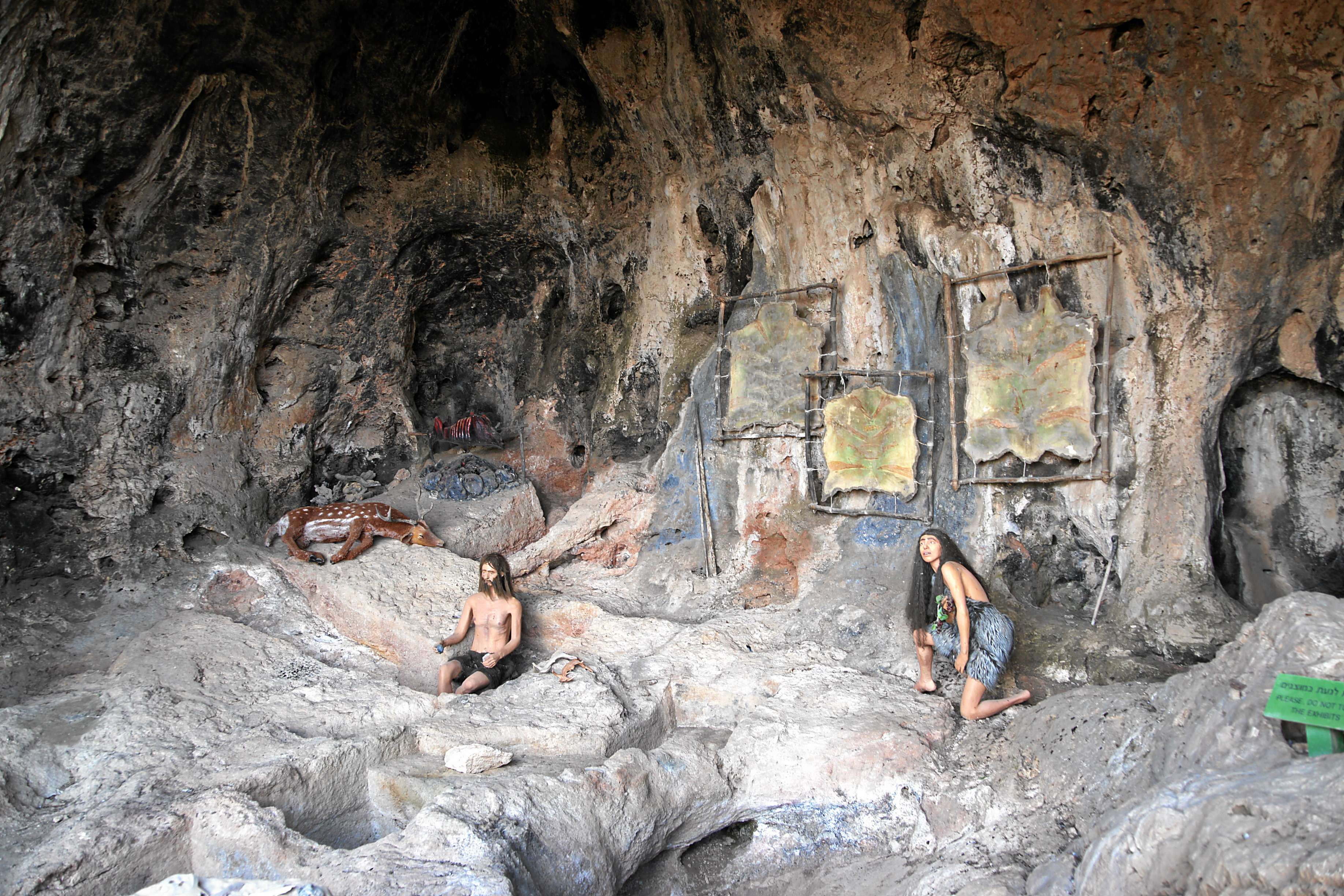 Nahal Me'Arot: Jamal Cave